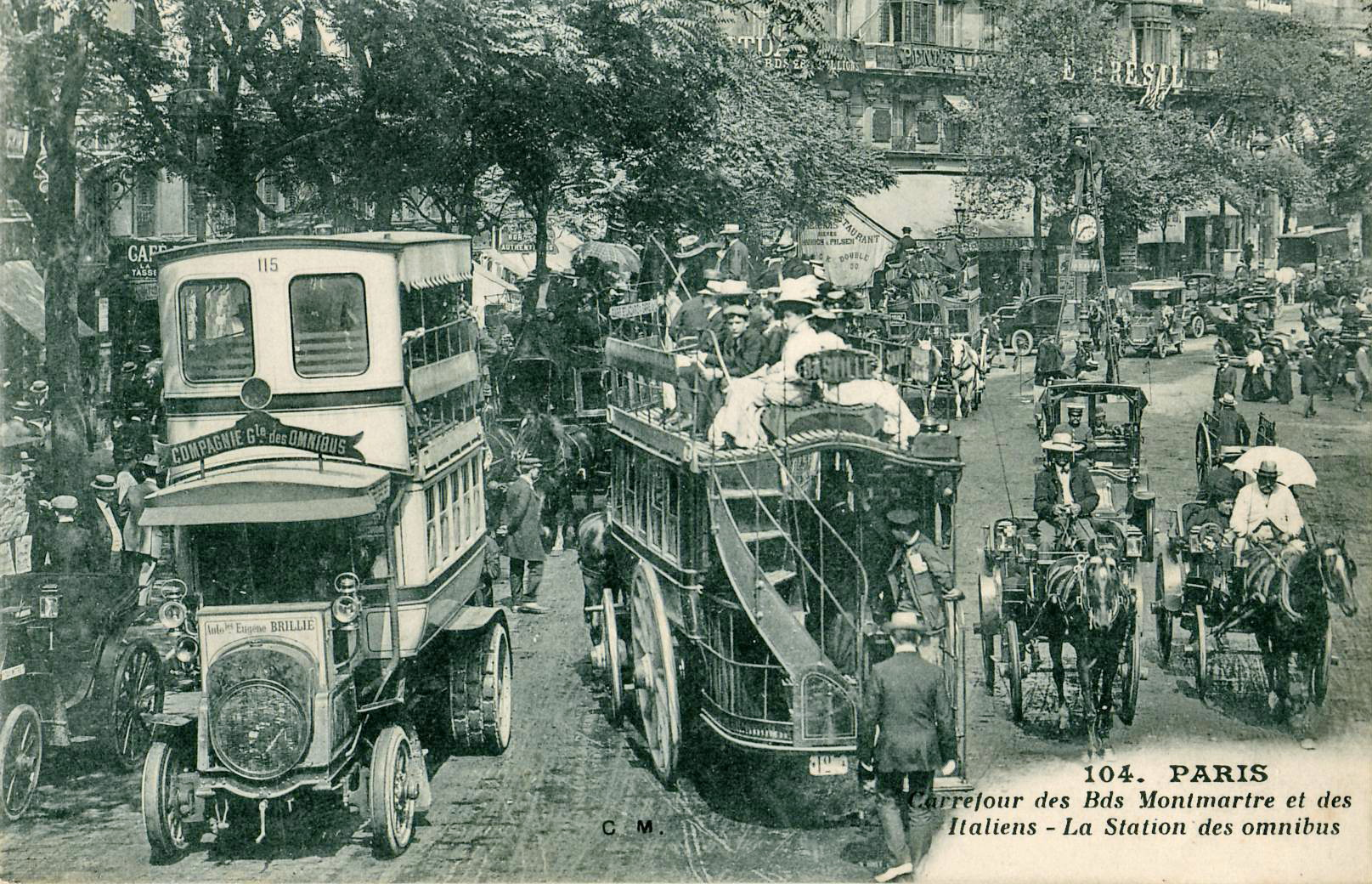 Carte postale ancienne éditée par CM N°104PARIS : Carrefour des boulevards Montmartre et des Italiens - La station des omnibusA gauche, autobus N°115 Schneider Brillié P2 de la Compagnie générale des omnibus, au centre, omnibus pour la Bastille